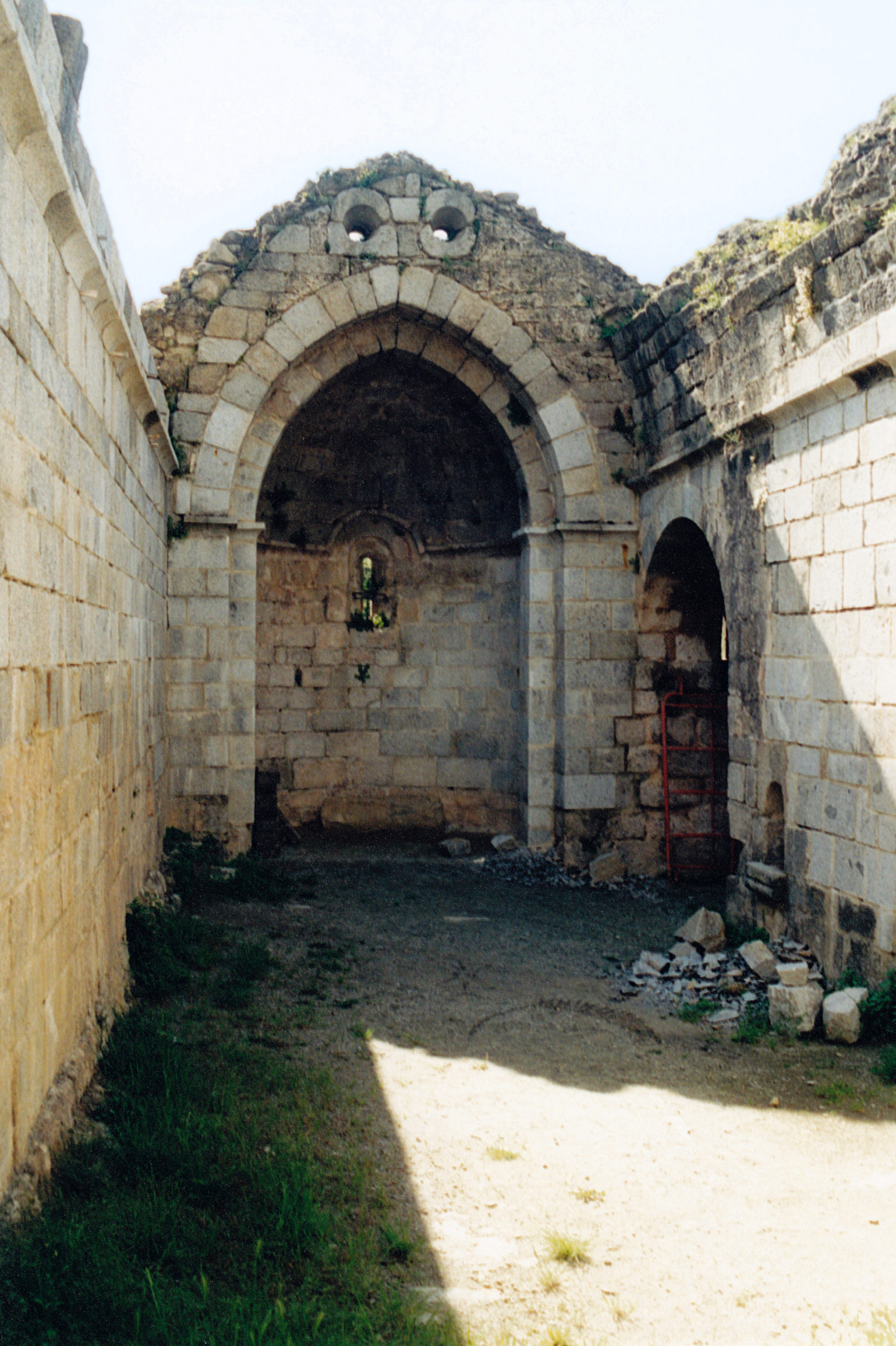 France - Pyrénées Orientales - Vallespir - Église Saint-Martin de Corsavy